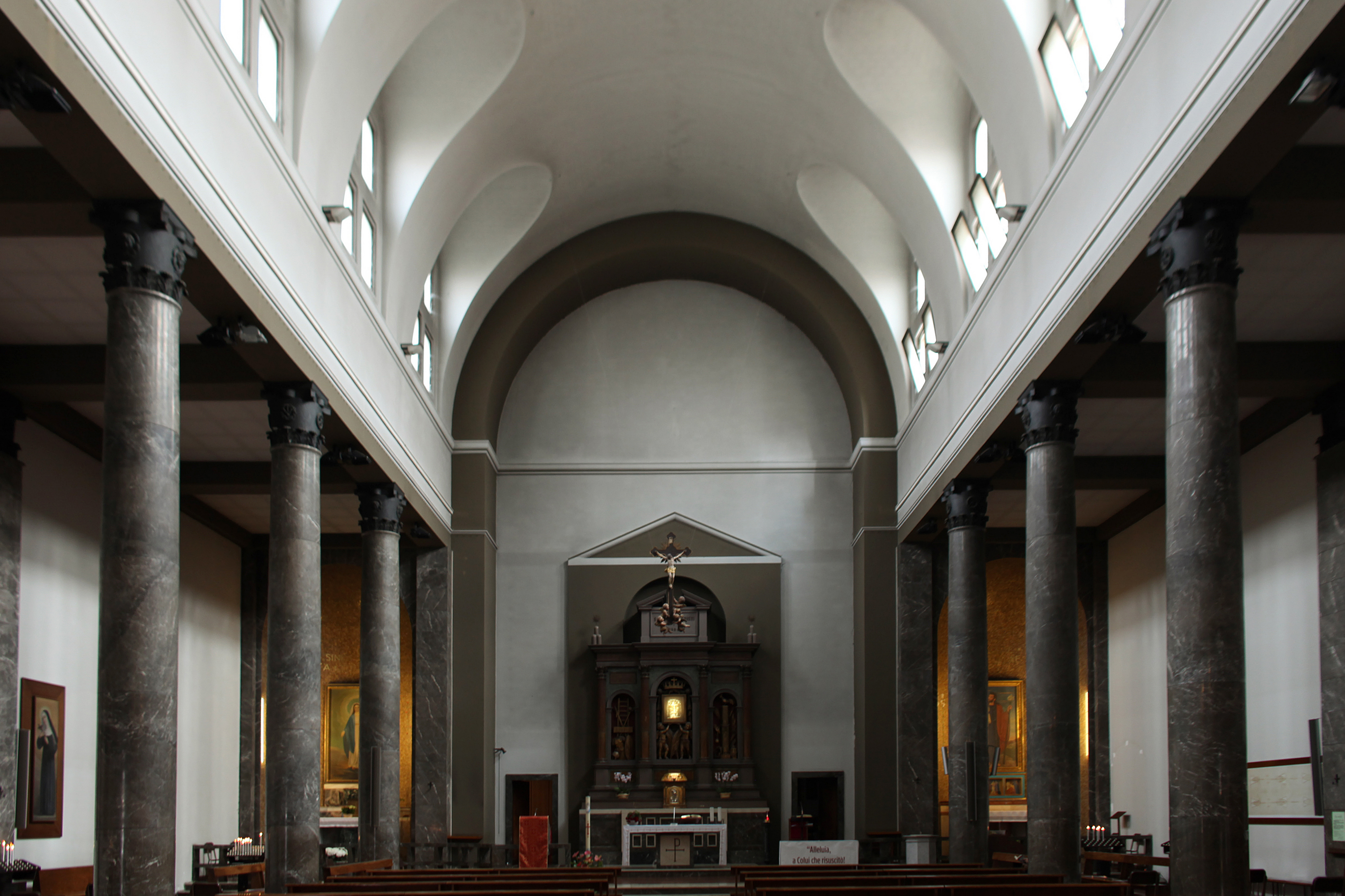 Chiesa del Sacro Volto di Milano, veduta della navata con l'altare